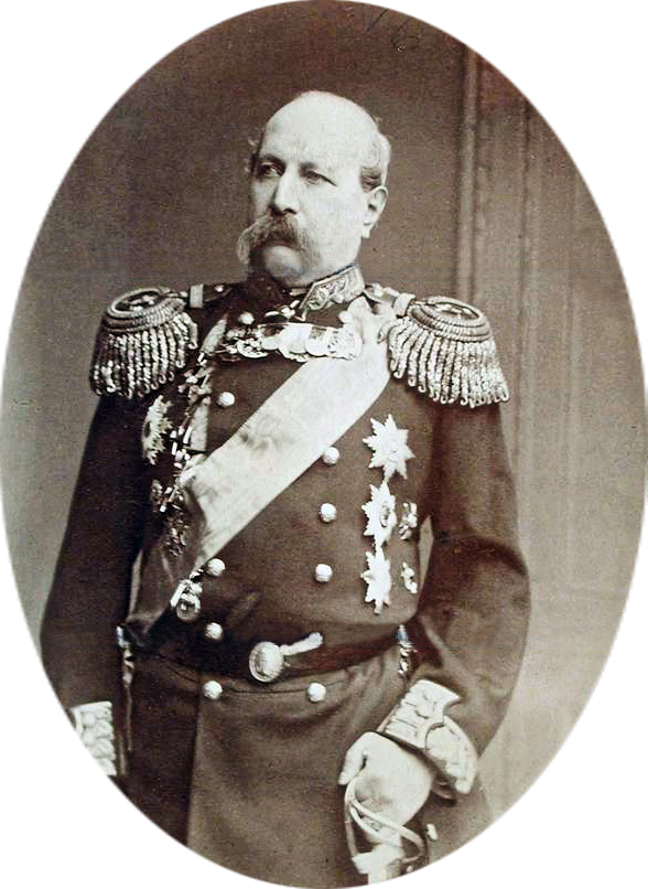 İbrahim bəy Aslanbəyov